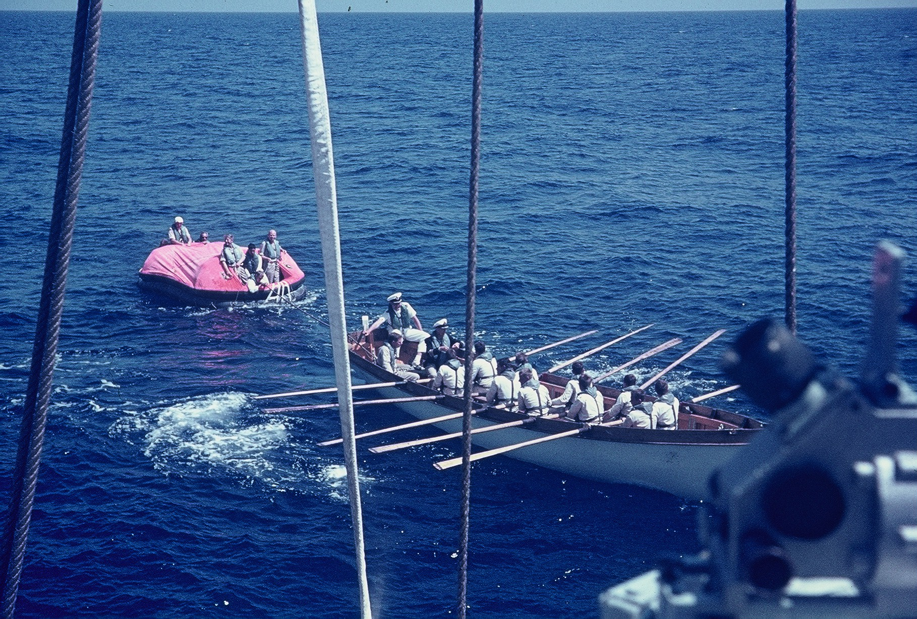 Zur Übung ausgebrachte Rettungsinsel und Kutter der Gorch Fock (1958) im Atlantik